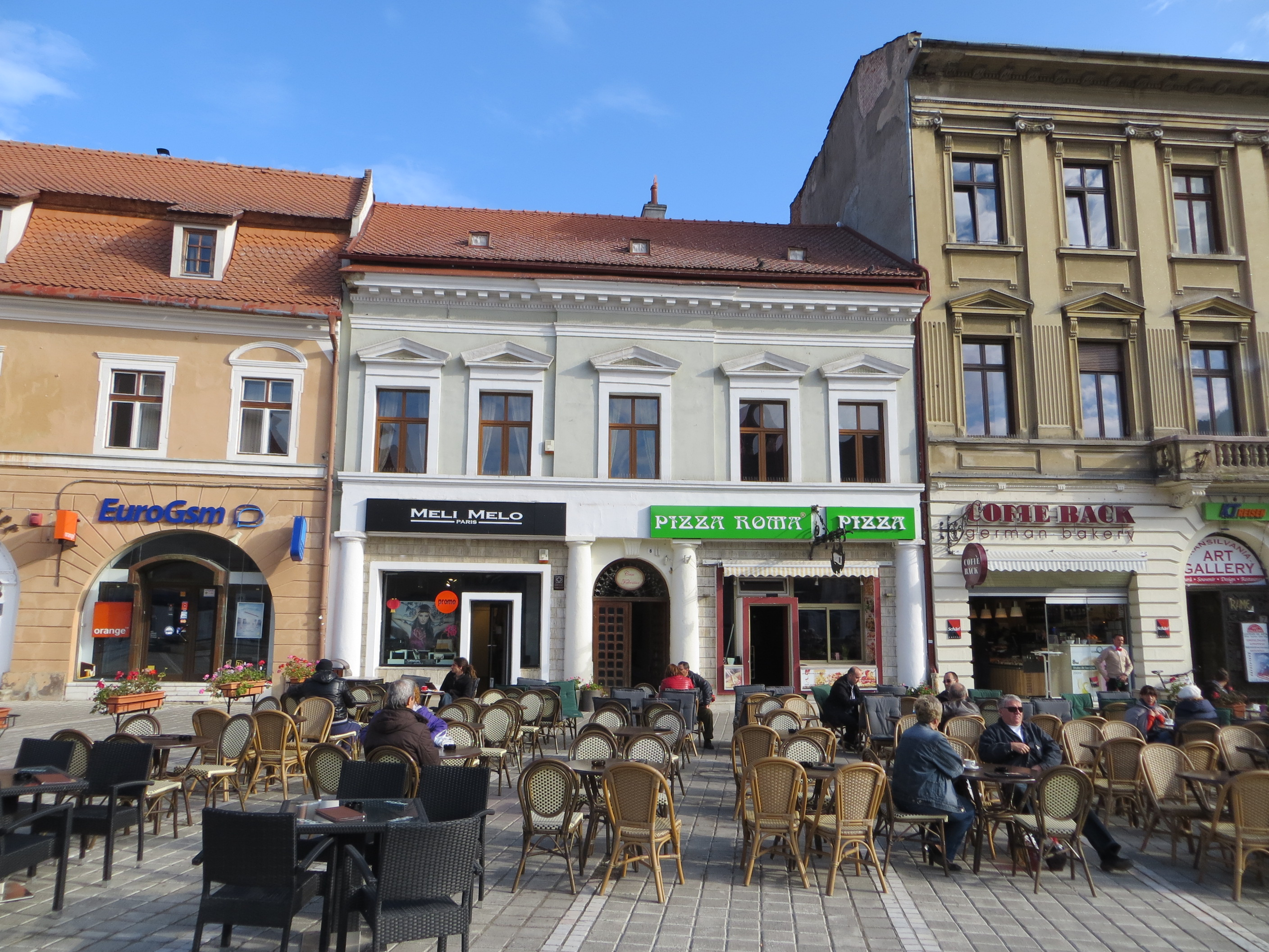 Casa Fabritius